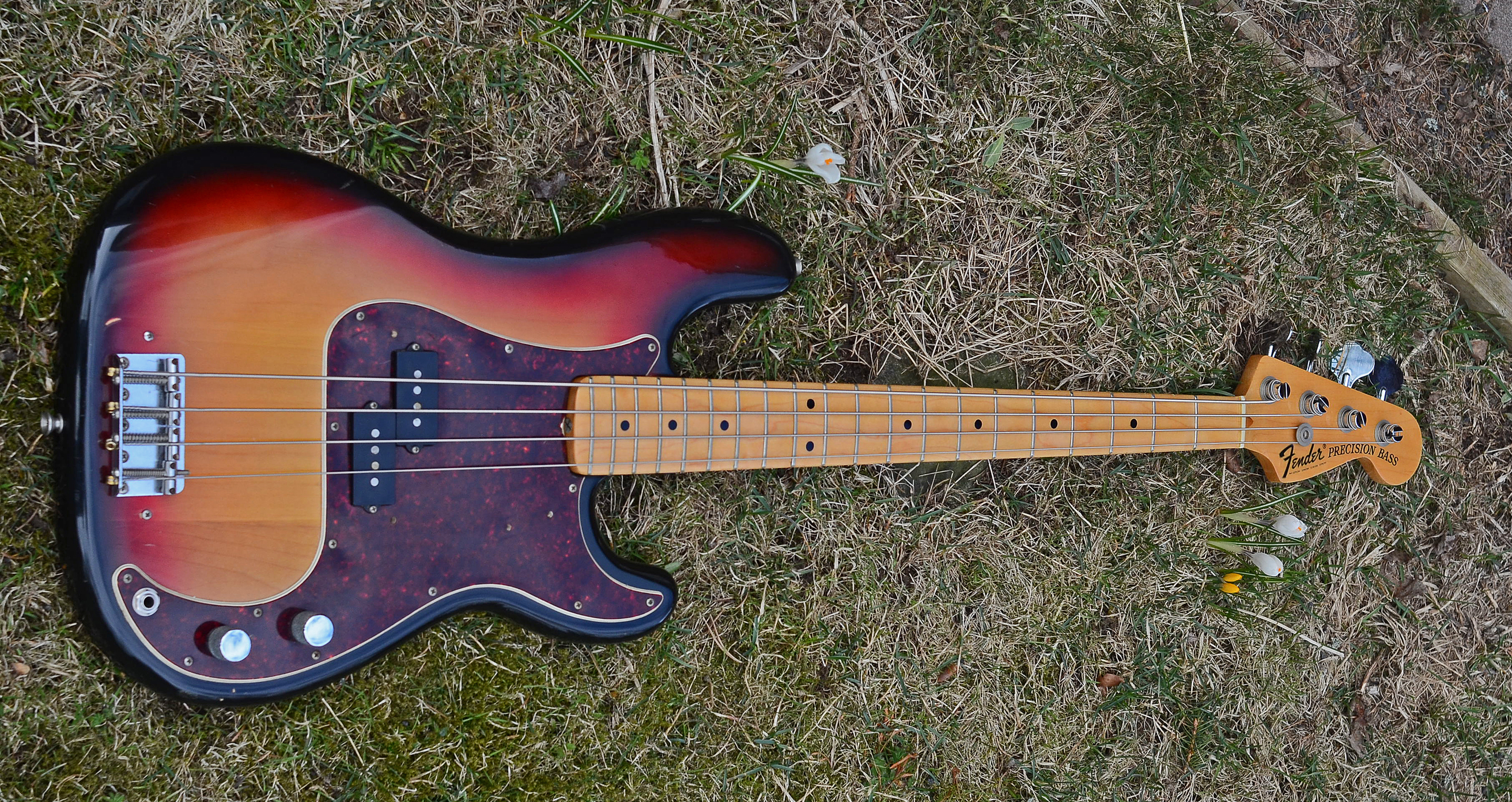 P-73